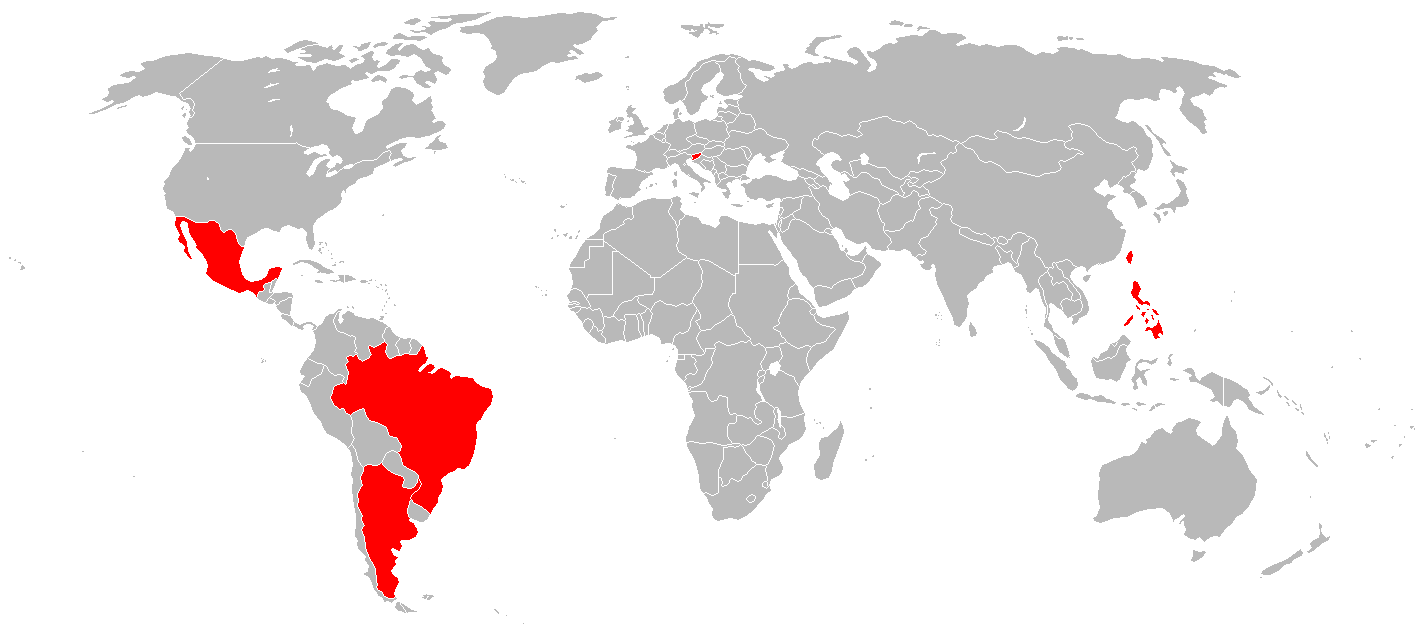 países usuarios y que seleccionaron/no seleccionaron el IAI Kfir.